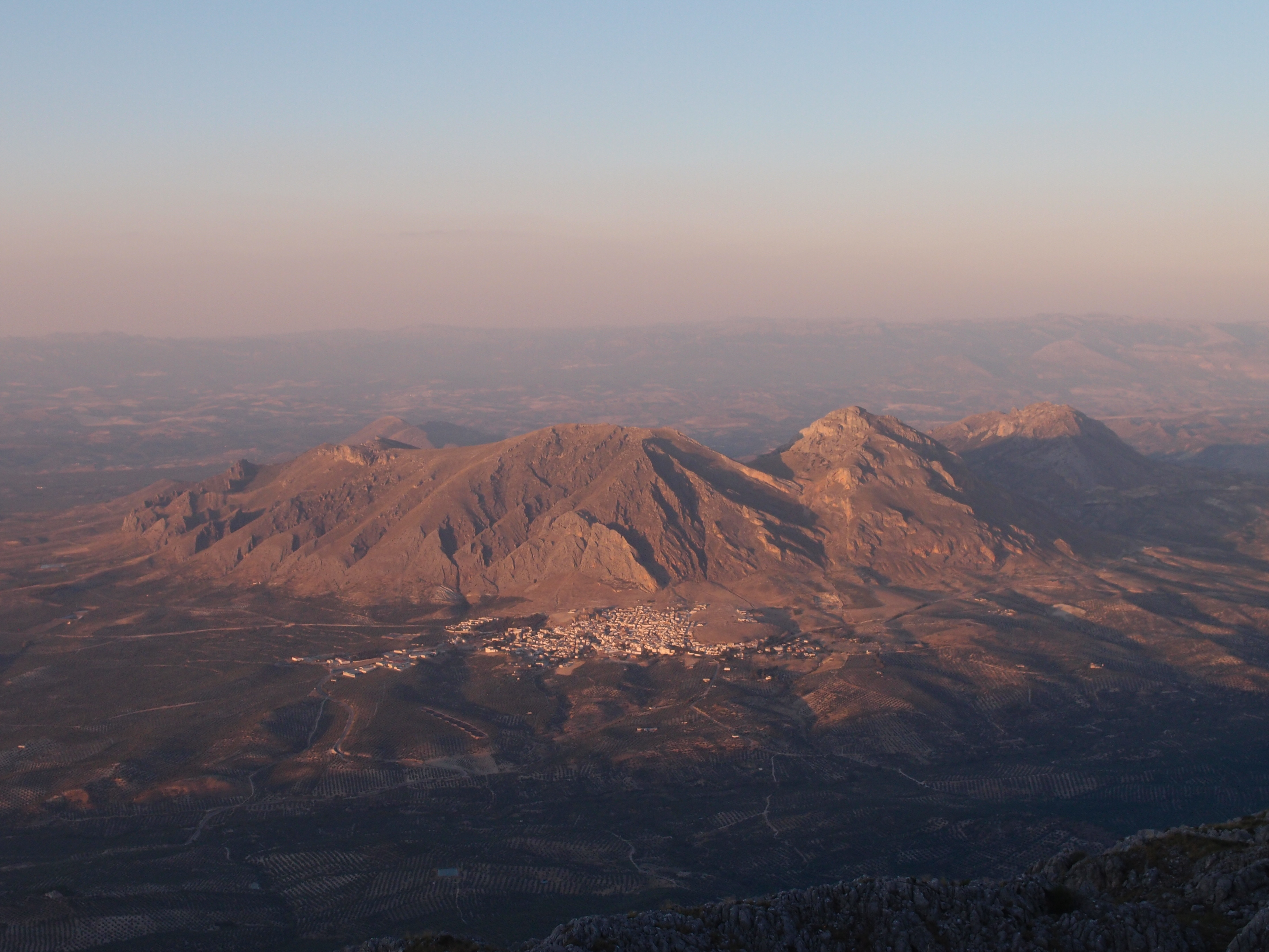 Vista general de Bedmar y su Serrezuela.